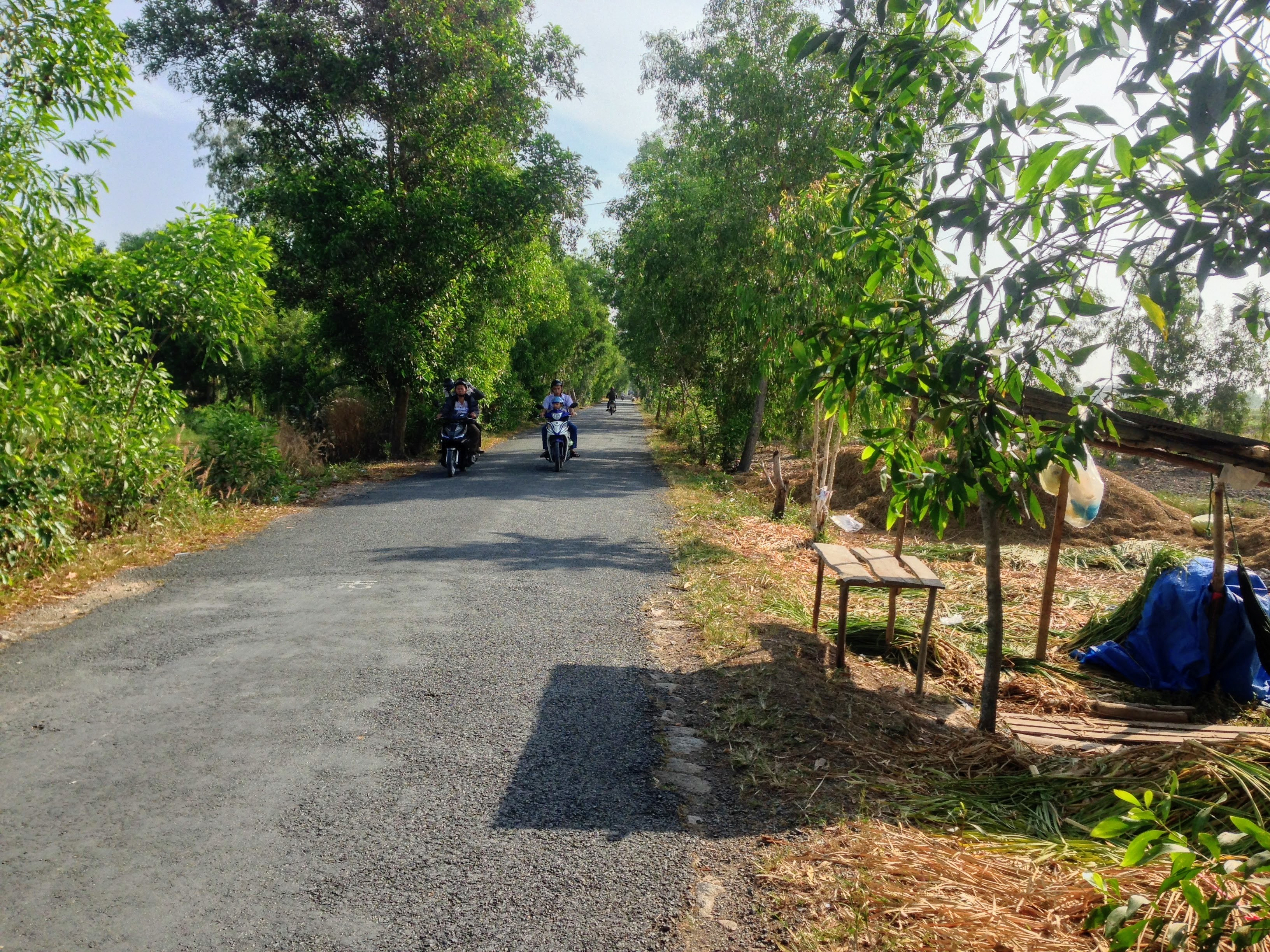 Hương Lộ U Minh - Khánh Hội